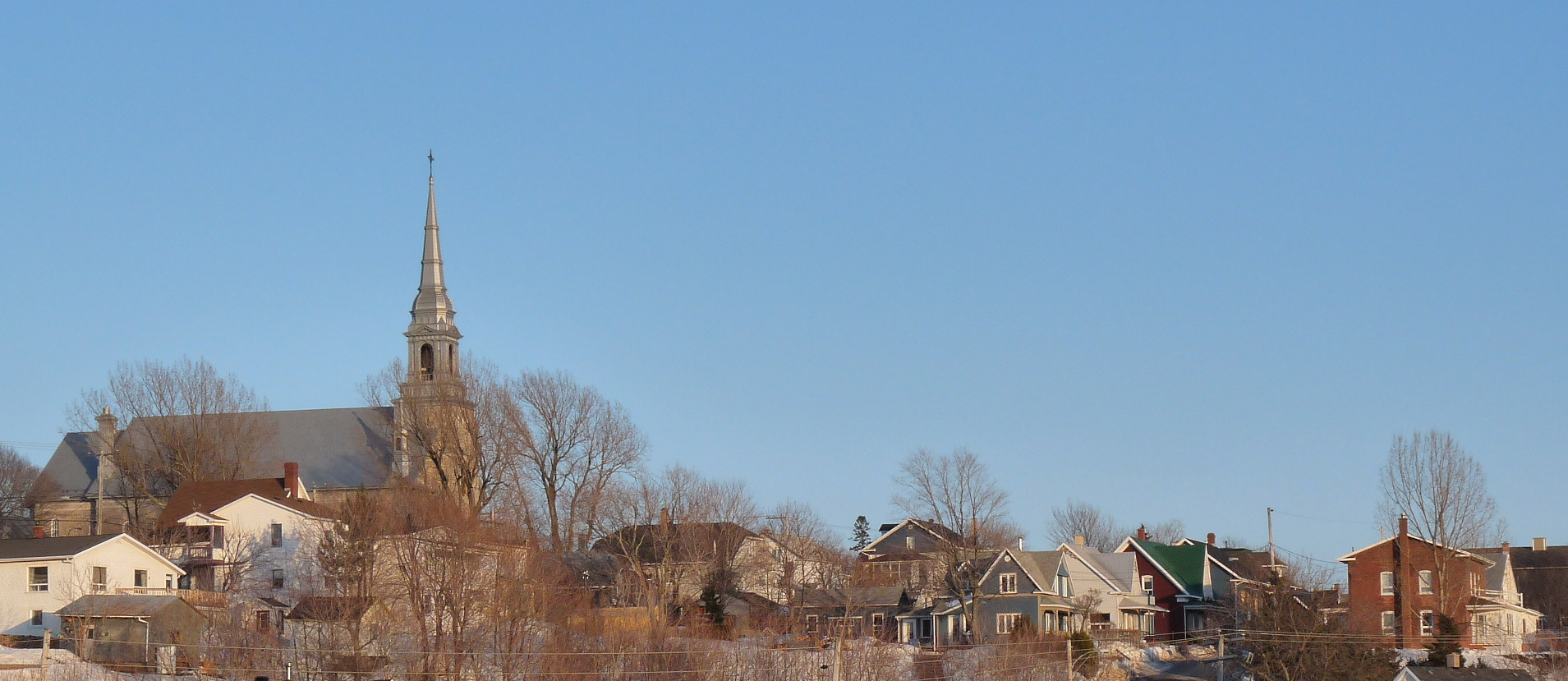 Apperçu du quartier Saint-Ludger à Rivière-du-Loup (Québec)